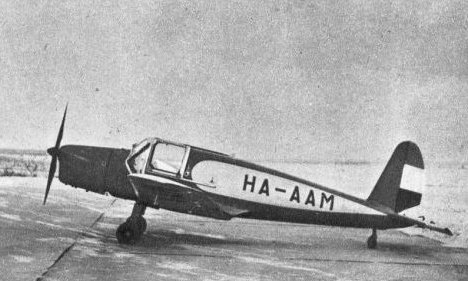 Horthy István kölcsönkapott egy Arado 79-es típusú, 100 lóerős sportgépet. A Budapest Bombay- Budapest távolságot, összességében a hét és fél nap alatt tette meg. Ennek során 12860 kilométert repült.